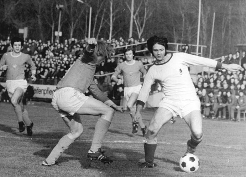 ADN-ZB-Kluge-26-1-74-Bau-Leipzig: Fußball-Oberliga - Chemie Leipzig gegen BFC Dynamo - Der Leipziger Mittelfeldspieler Otto Skrowny scheitert bei einem Angriff an seinem Gegenspieler Peter Rohde (BFC, links).